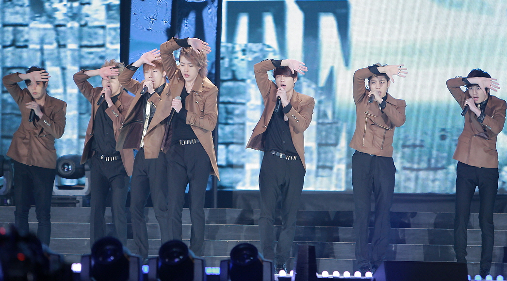 2012.03.11 2012 k collection in seoul 올림픽 체조경기장 인피니트 _ B.T.D / 내꺼하자